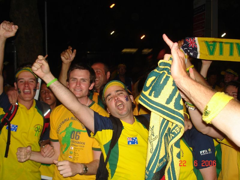 Aussie fans are singing...